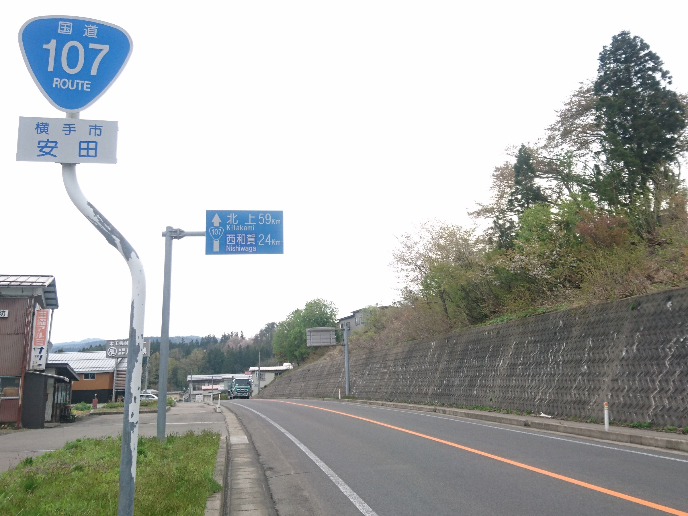 横手市安田付近の国道107号。